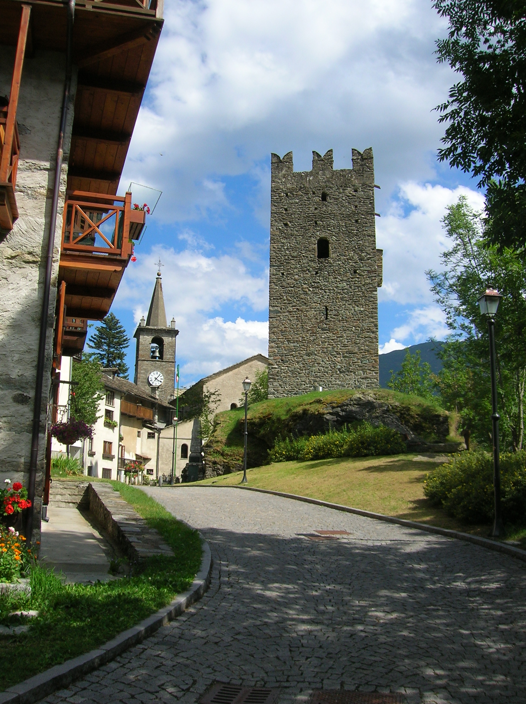 Castello di Champorcher. Champorcher, Valle d'Aosta, Italia.